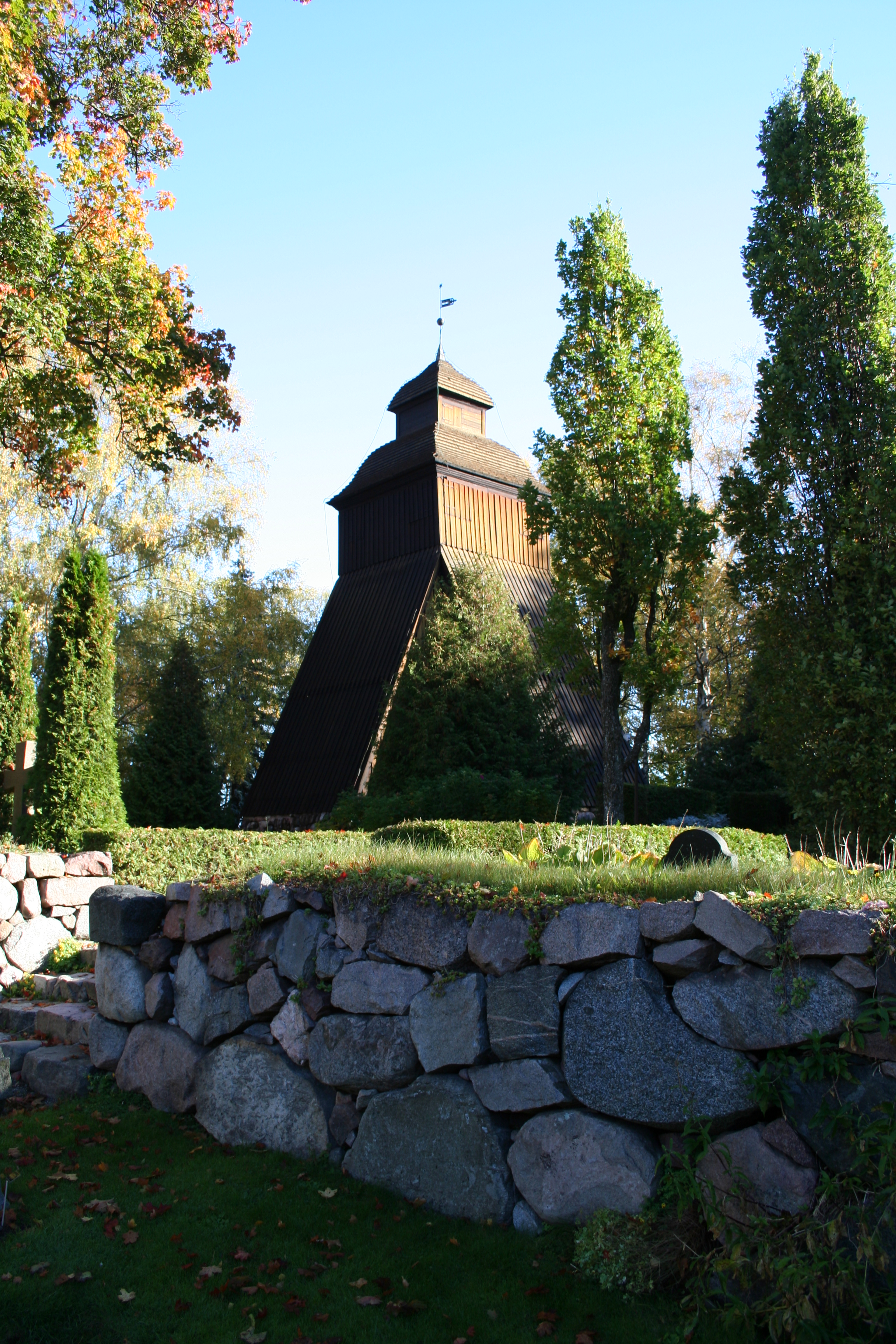 Danderyds kyrkas klockstapel Källa: eget foto, fotograf EnDumEn 4 oktober 2007.